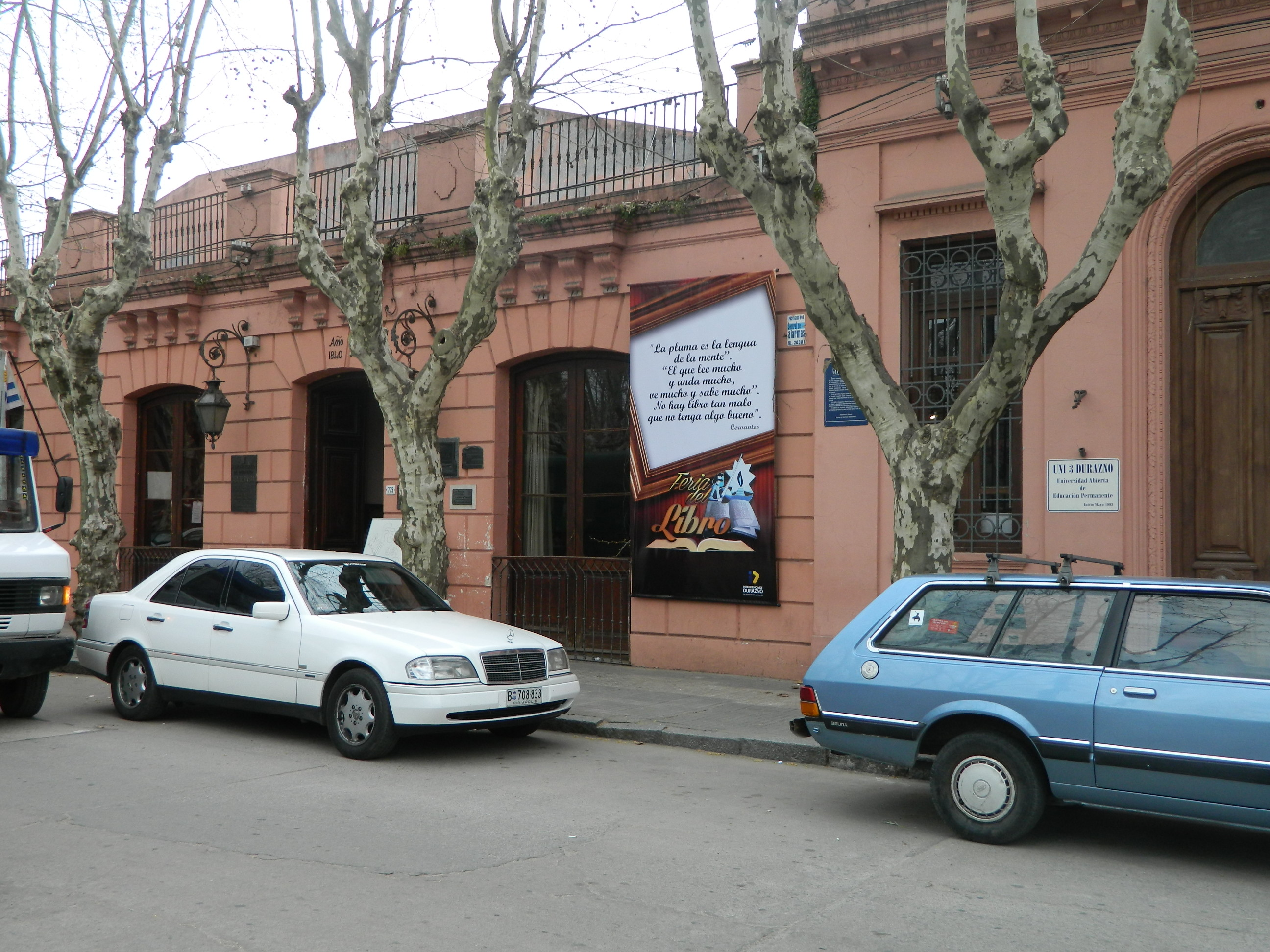 Casa en que vivió Fructuoso Rivera y casa de gobierno. Ubicada frente a la Plaza Independencia, calle Manuel Oribe 779 entre Batlle y Rivera de la ciudad de Durazno. Es uno de los más importantes Monumentos Históricos del período de nacimiento del Estado Oriental. En esa casa Rivera asume en 1839 su segunda presidencia. Desde 1992 es sede del Museo Histórico "Casa de Rivera". Ubicada en el departamento de Durazno